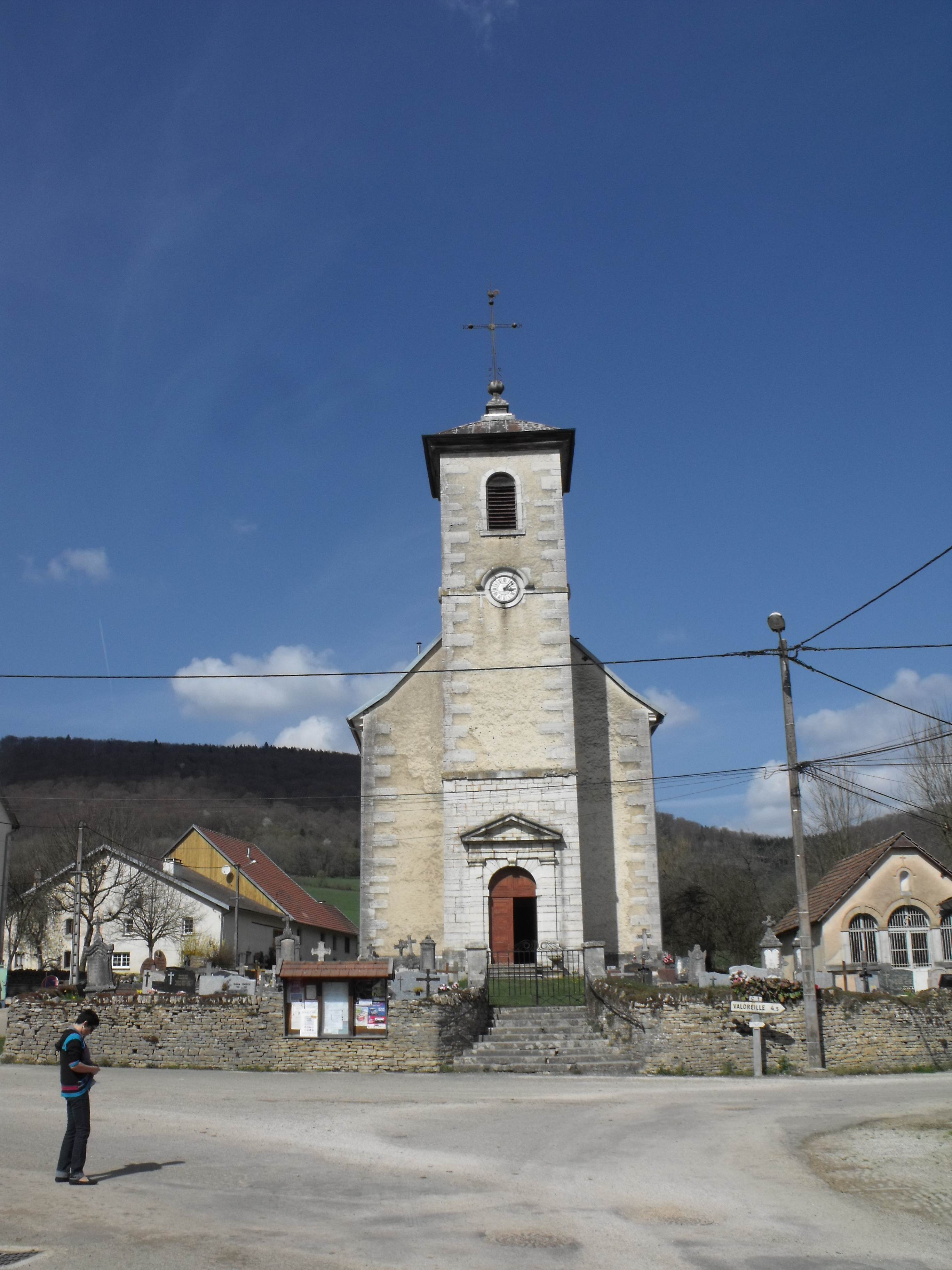 L'église de Vauclusotte, Doubs, France